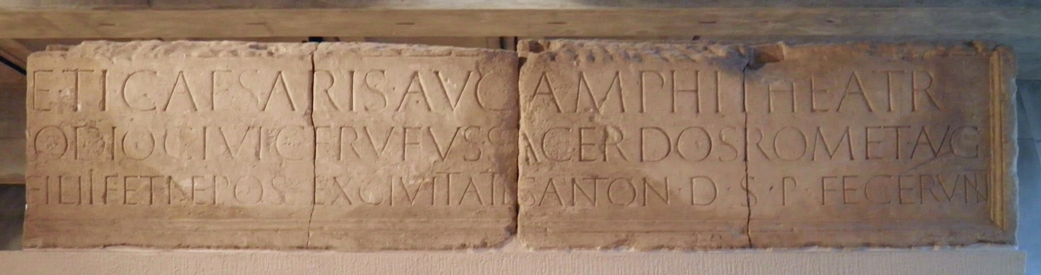 [Pro salut]/e Ti(beri) Caesaris Aug-usti) Amphitheatr(i) / [- - cum p]odio C(aius) Iul(ius); C(aii) f(ilius) Rufus, s/acerdos Rom(ae) et Aug(usti); / [---]filii f(ilius) et nepos, ex civitate Santon(um), d(e) s(ua) p(ecunia) fecerunt.